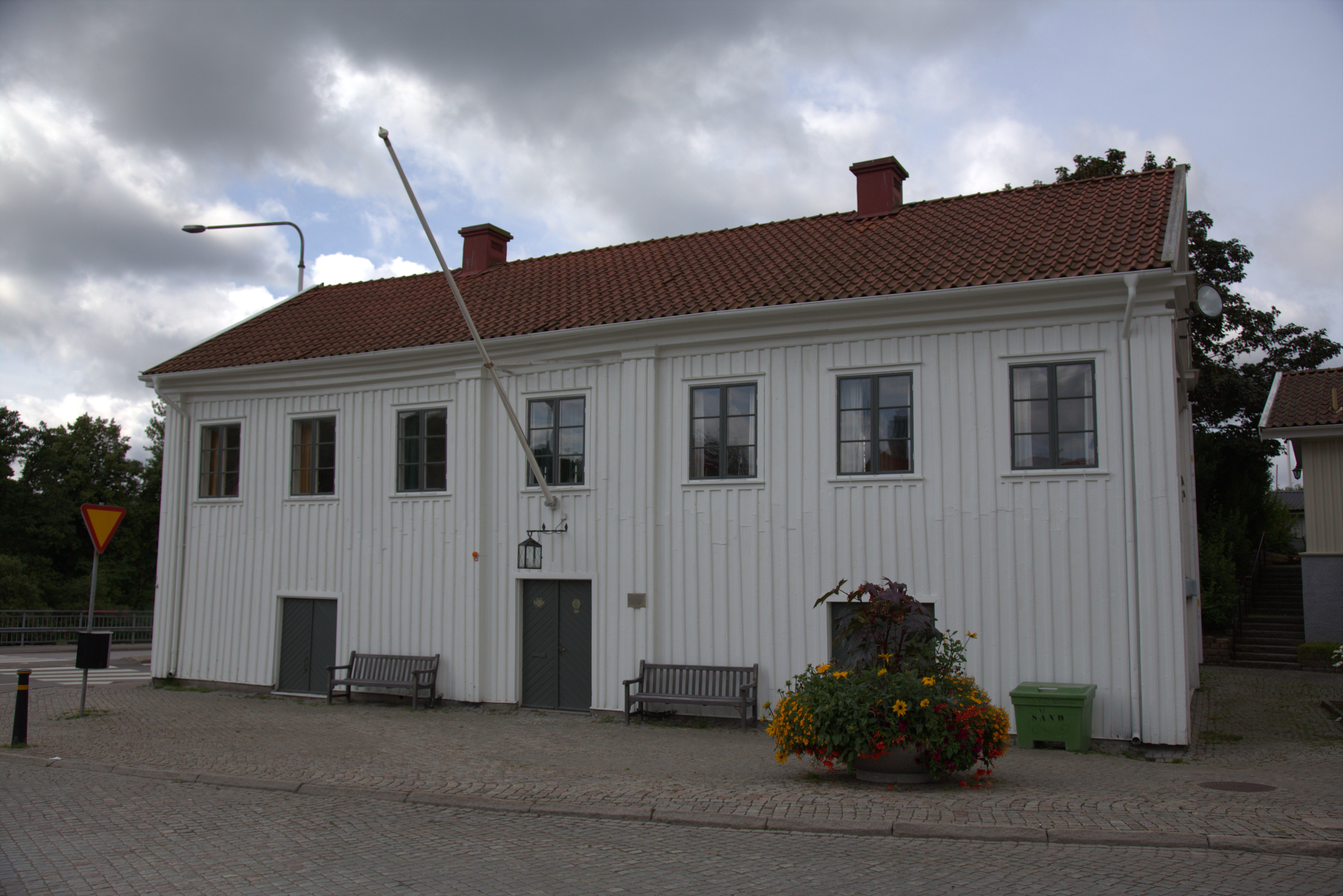 Kungälvs gamla rådhus sedd framifrån (från gamla torget).